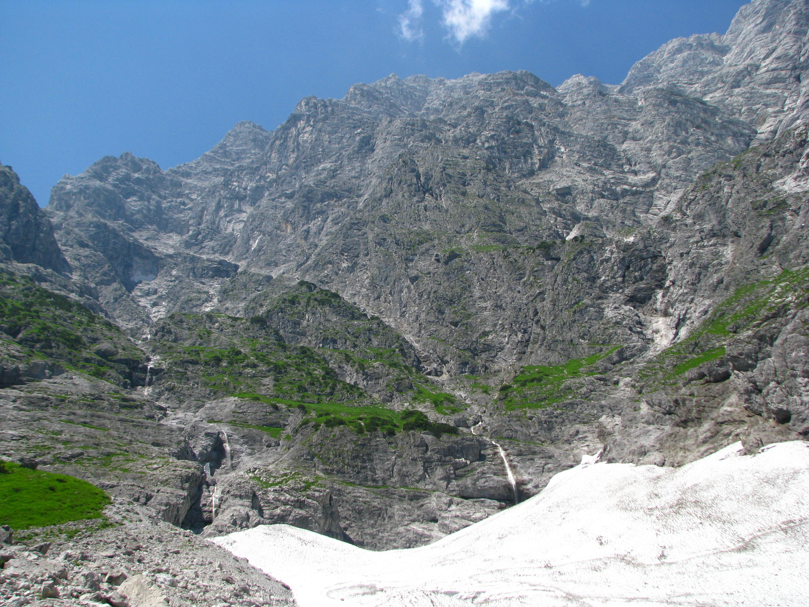 Watzmann-Ostwand in ihrer gesamten Dimension vom Wandfuß an der Eiskapelle her gesehen.